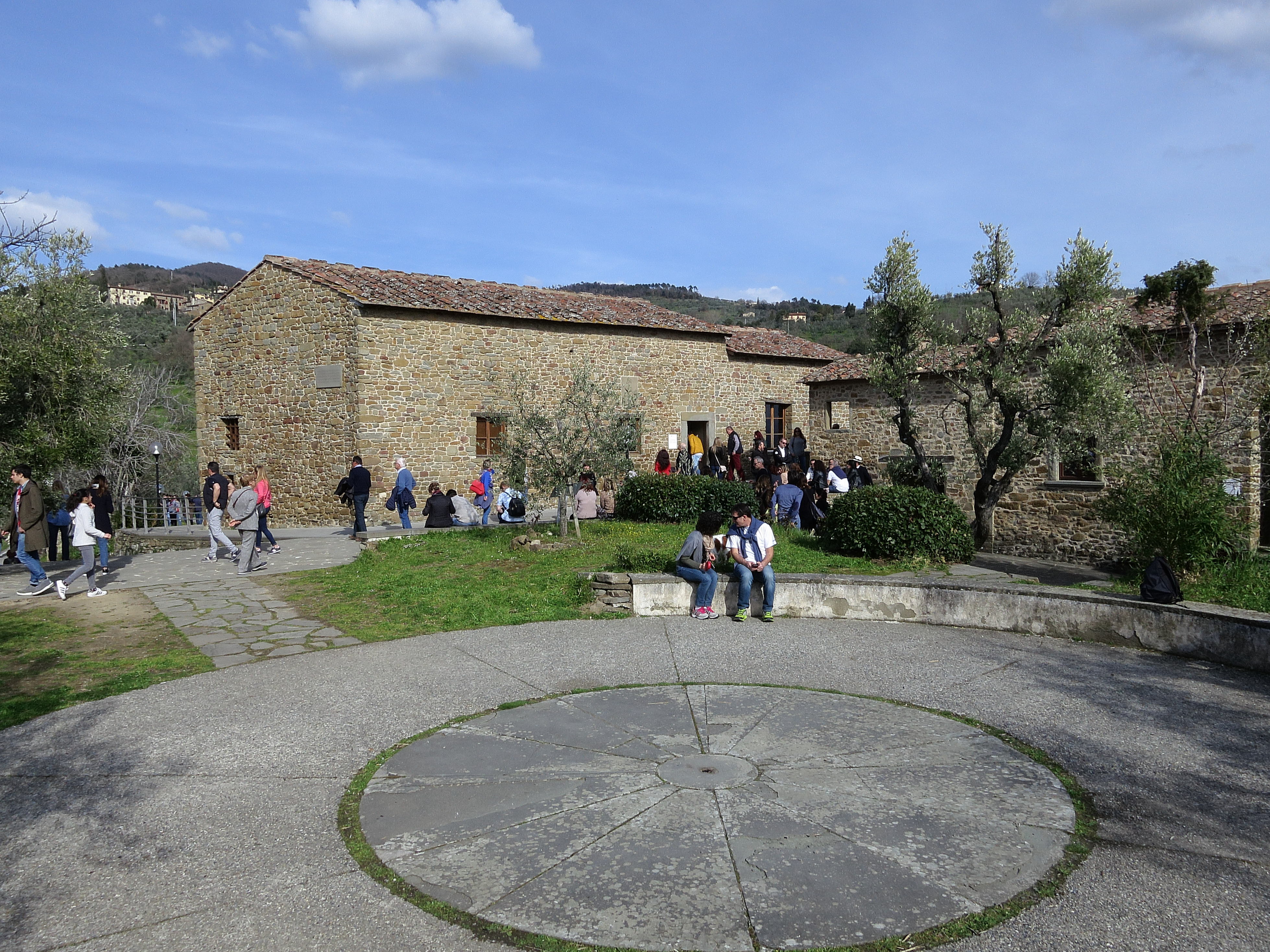 Das Geburtshaus von Leonardo da Vinci in Anchiano bei Vinci (Toskana, Italien)